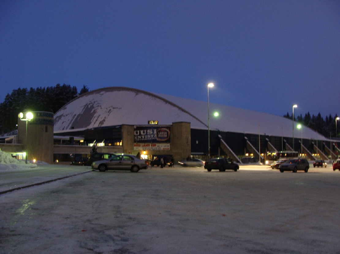 Lahden Suurhalli